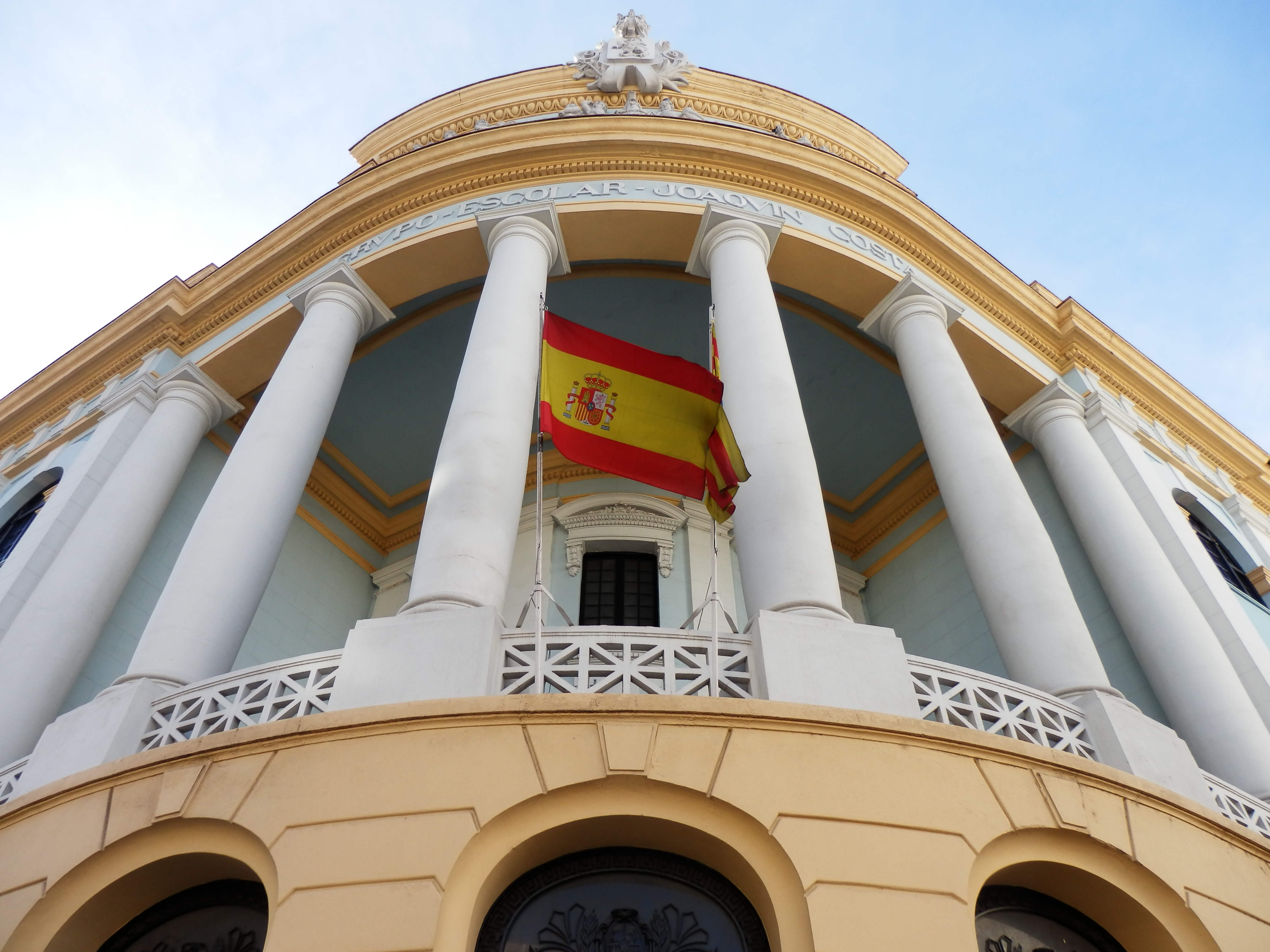 Grupo Escolar Joaquín Costa en la calle General Mayandía de Zaragoza.